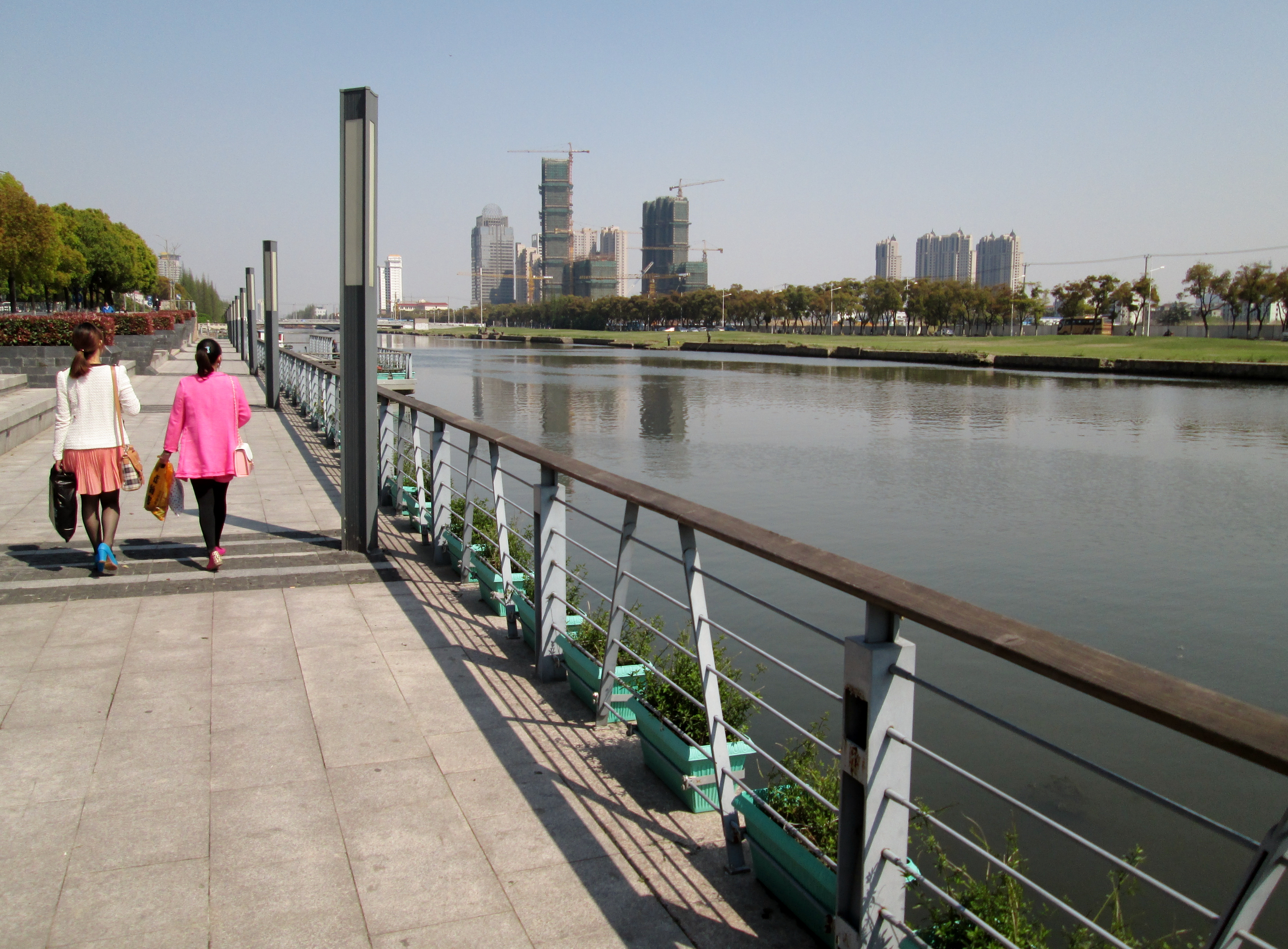 Loujiang River, Kunshan